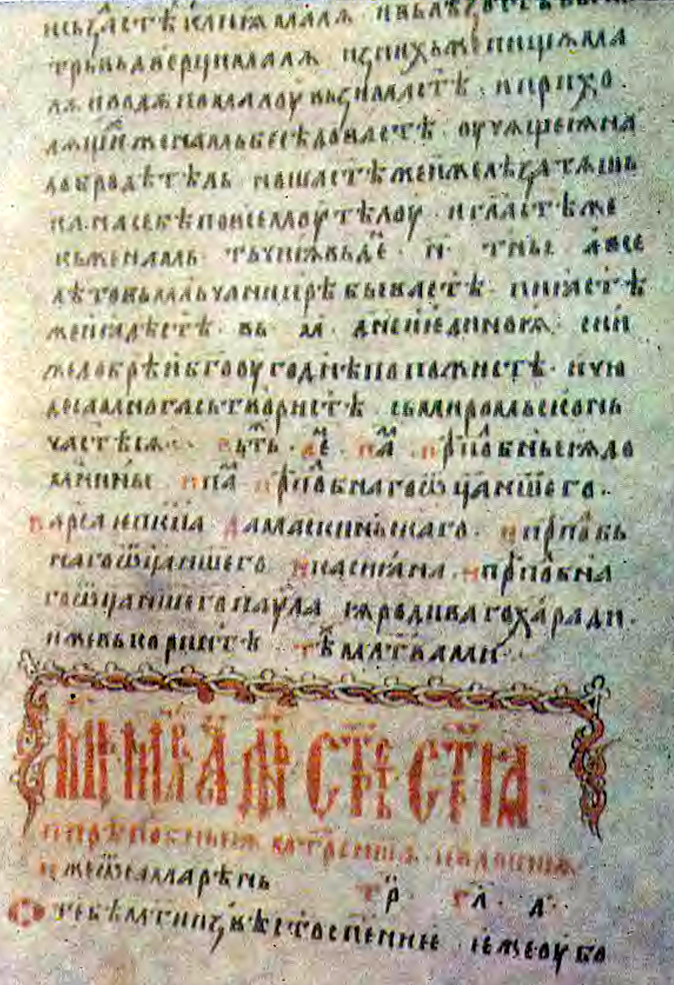 Станиславов пролог